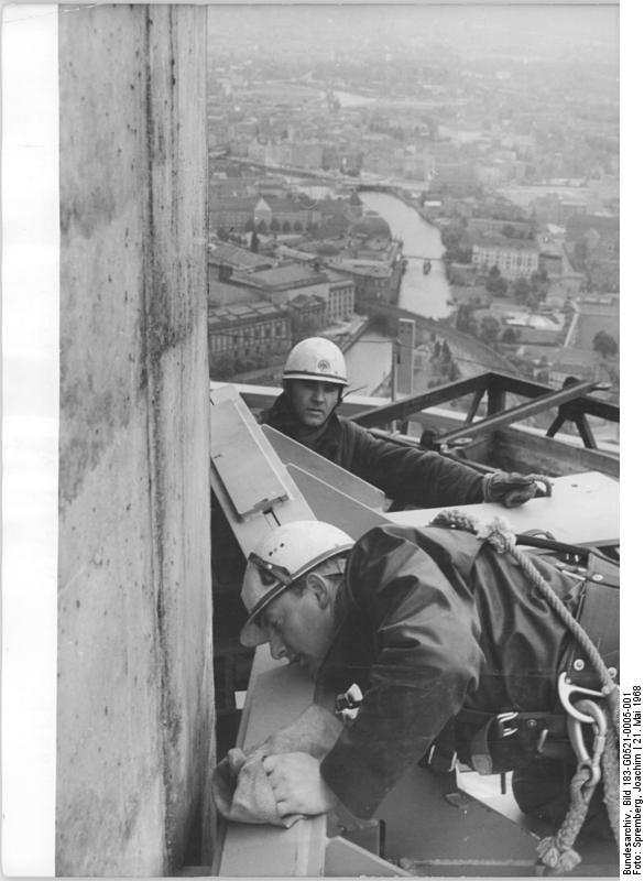 Zentralbild Spremberg 21.5.1968 Berlin: Harry Fischer - einer der "Luftakrobaten" vom Fernsehturm Der 44-jährige Monteur vom VEB Industriemontagen Leipzig gehört zu den Spezialisten, die nun bereits in 216 Meter Höhe an der Stahlskelett-Konstruktion für die tonnenschwere Kugel des Fernsehturmes arbeiten. Harry Fischer, ein gelernter Schlosser, kennt viele Großbaustellen der DDR. Seit 1951 war er unter anderem beim Bau des Stahl- und Walzwerkes Gröditz dabei; auch auf dem 360-m-Sendeturm bei Oranienburg stellte er sein Können unter Beweis. Die Männder des VEB Industriemontagen arbeiten auch in der schwindelnden Höhe über dem Berliner Stadtzentrum zügig. Die Arbeiten an der Stahlkonstruktion liegen bereits über dem künftigen Turmcafe - die Kugel nimmt Gestalt an.